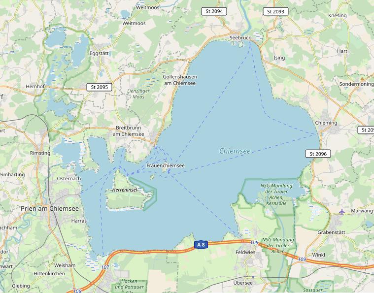 carte réalisée sur umap This map may be incomplete, and may contain errors. Don't rely solely on it for navigation.